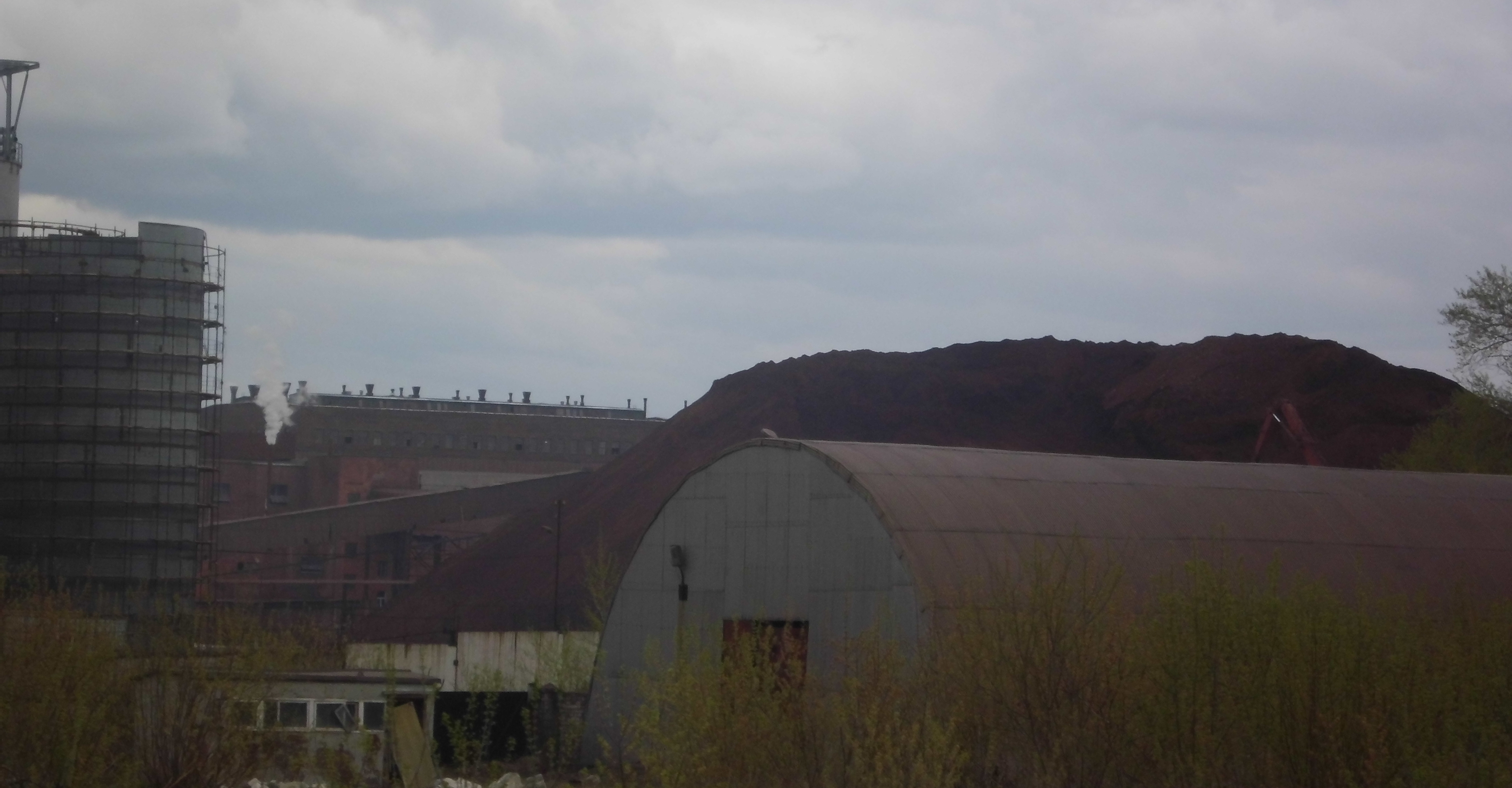 Уральский алюминиевый завод, г. Каменс-Уральский. Россия